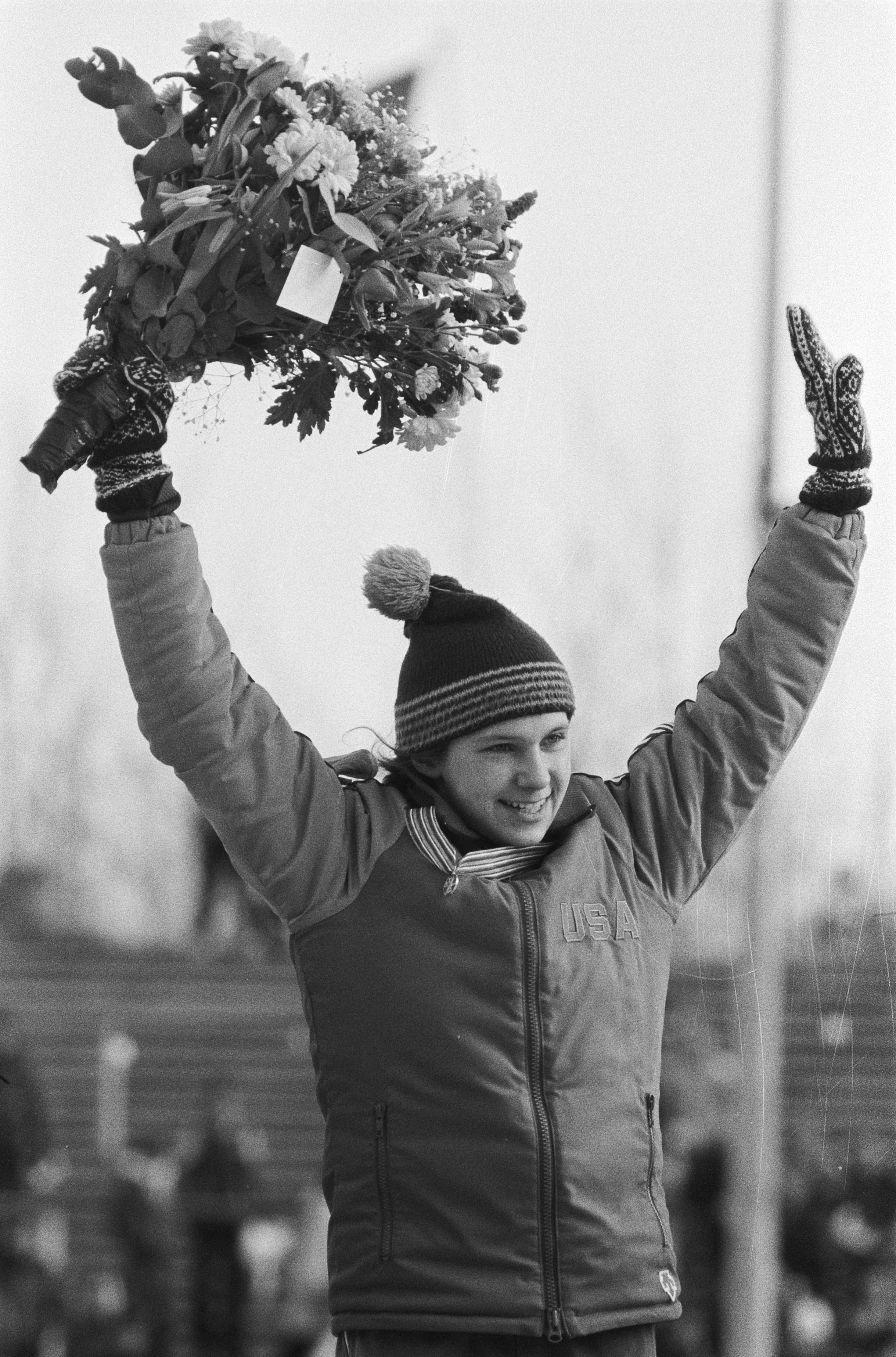 Collectie / Archief : Fotocollectie Anefo Reportage / Serie : [ onbekend ] Beschrijving : Wereldkampioenschappen schaatsen dames allround in Den Haag. Beth Heiden (Verenigde Staten) tijdens de huldiging als winnares van de 500 meter. Datum : 3 februari 1979 Locatie : Den Haag, Zuid-Holland Trefwoorden : schaatsen, sport Persoonsnaam : Heiden Beth Fotograaf : Suyk, Koen / Anefo Auteursrechthebbende : Nationaal Archief Materiaalsoort : Negatief (zwart/wit) Nummer archiefinventaris : bekijk toegang 2.24.01.05 Bestanddeelnummer : 930-1058